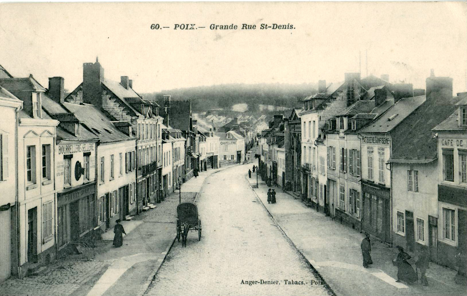 Carte postale ancienne éditée par Anger-Denier, tabac à Poix, n°60 : POIX - Grande Rue St-Denis